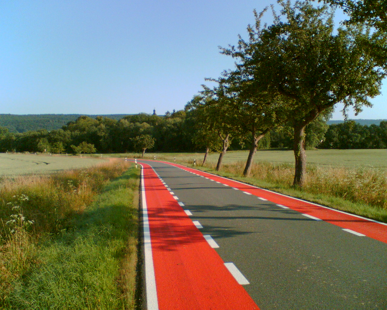 Die Kreisstraße zwischen Eilensen und Erichsburg wurde 2013 farbig markiert. Diese Strecke ist zugleich ein Abschnitt des Europaradweges R1. Pilotprojekt nach Bundesratsdrucksache 375/97: Modellversuch zur Abmarkierung von Schutzstreifen außerorts und zur Untersuchung der Auswirkungen auf die Sicherheit und Attraktivität im Radverkehrsnetz.